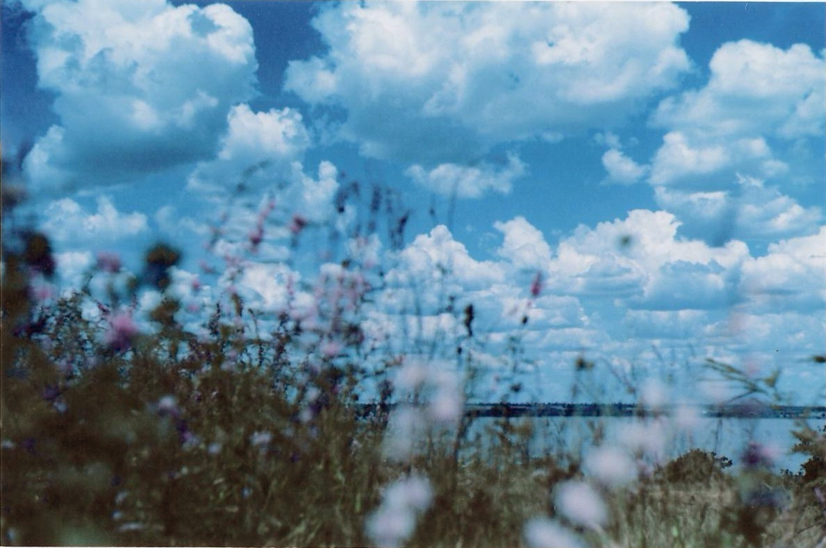 Descrição: Vegetação rasteira da Cascalheira, em Três Lagoas, Mato Grosso do Sul, Brasil. 2007.